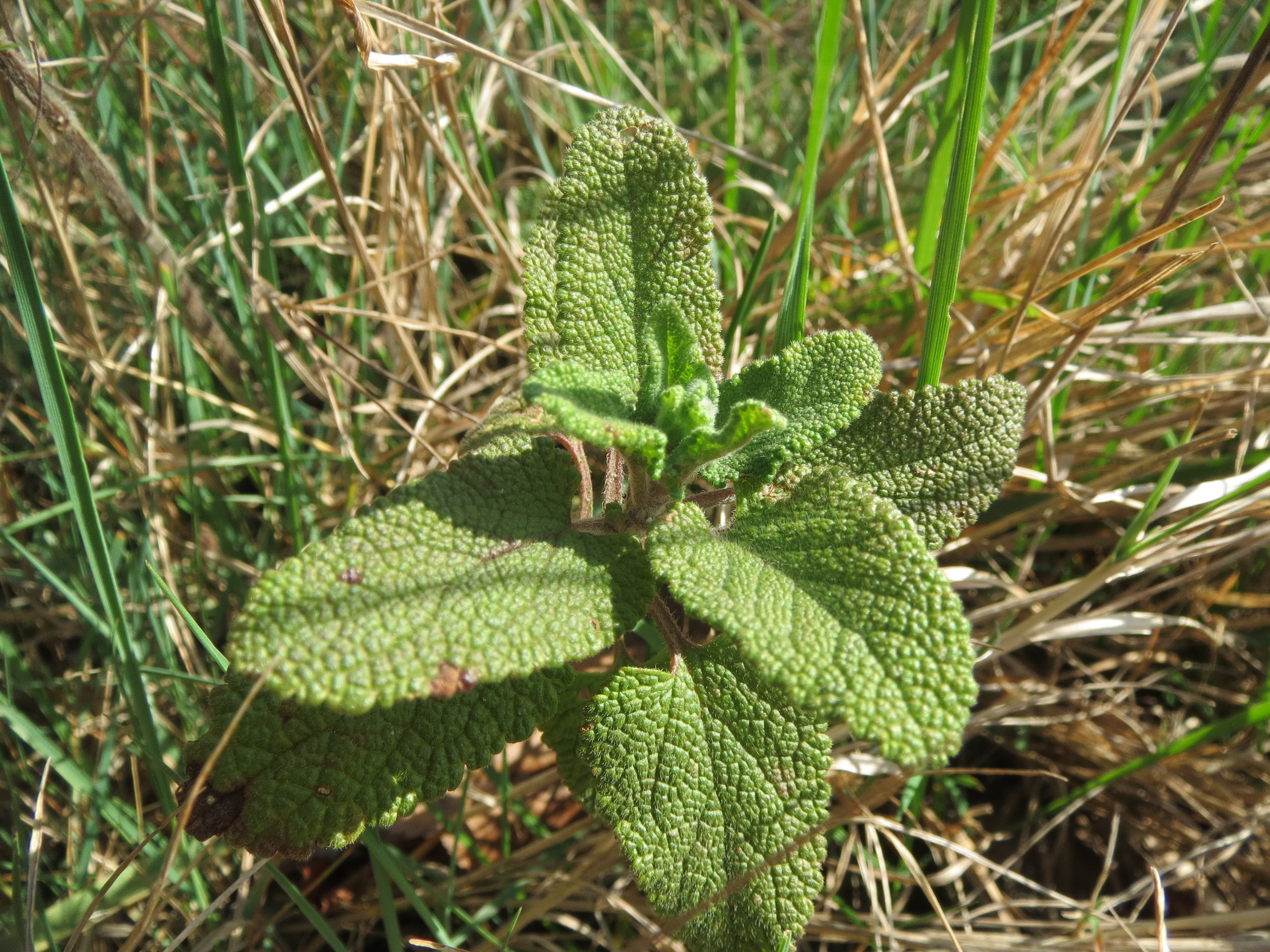 Salbei-Gamander (Teucrium scorodonia) im Schwetzinger Hardt